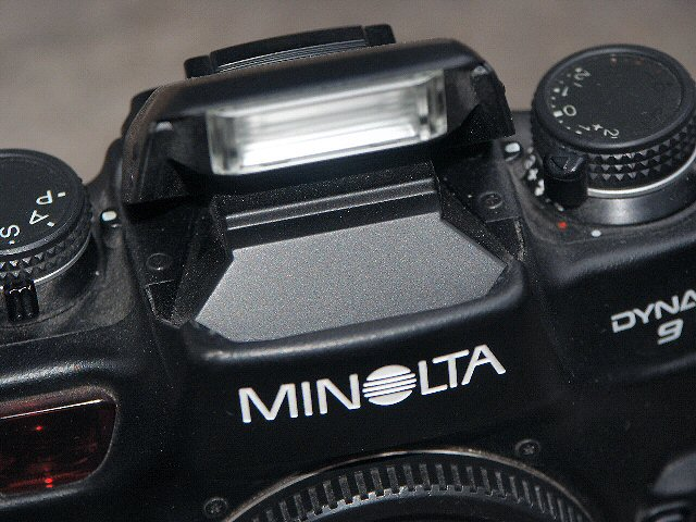 Minolta Dynax 9 - Pentaprisma und internes Blitzgerät (Fotografiert mit: Minolta Dimage 7 Hi)